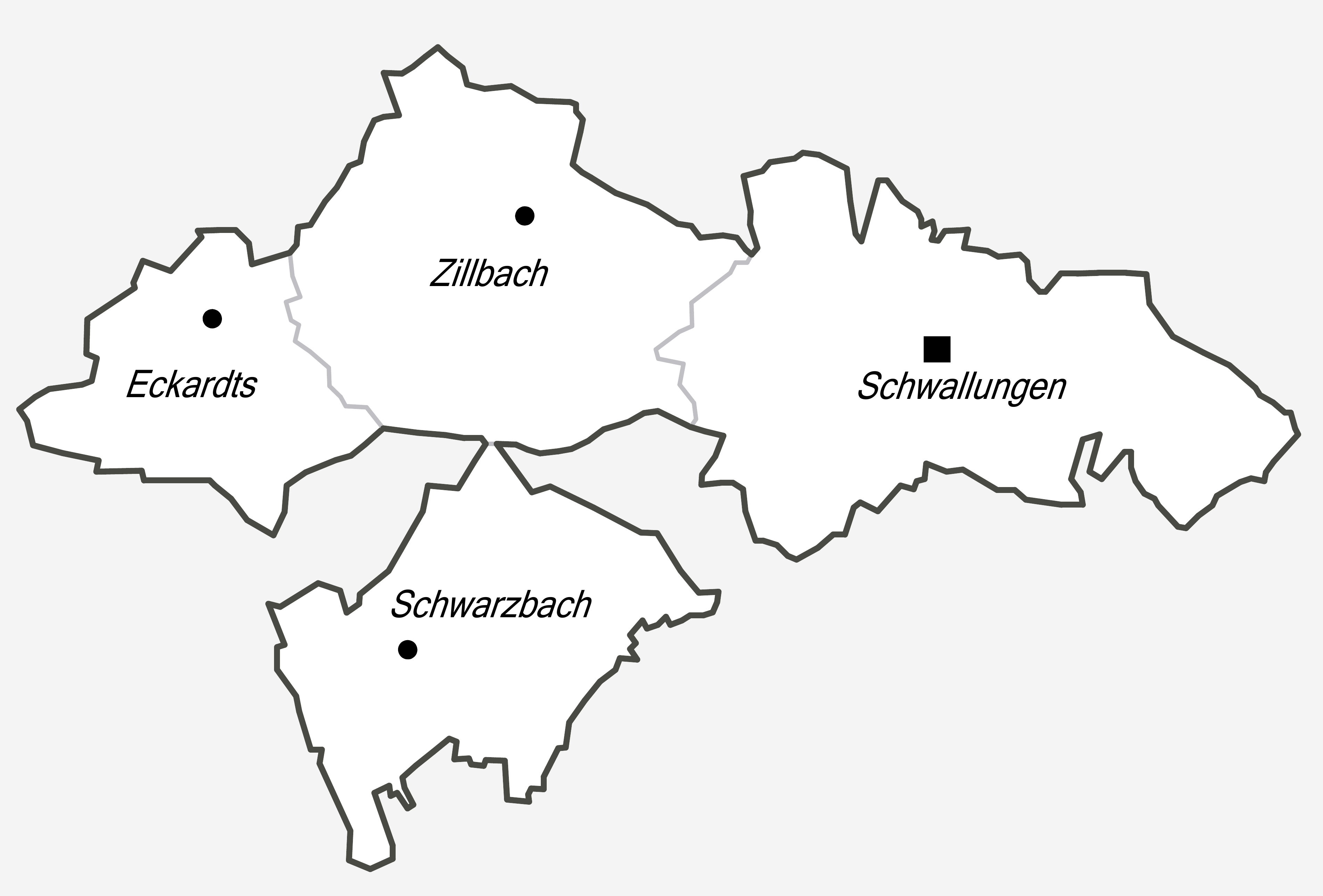 Districts of Schwallungen